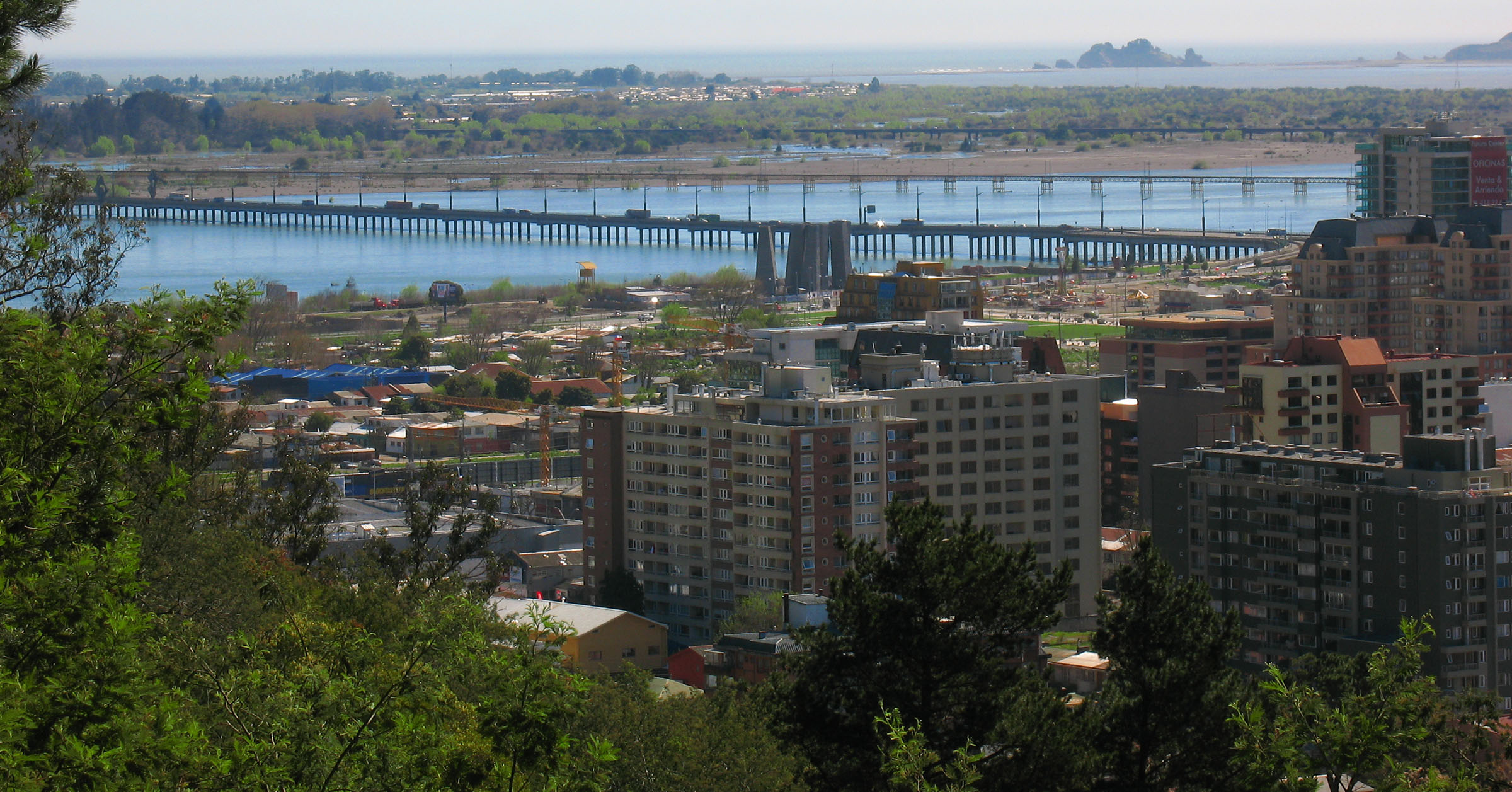 Vista a concepción.